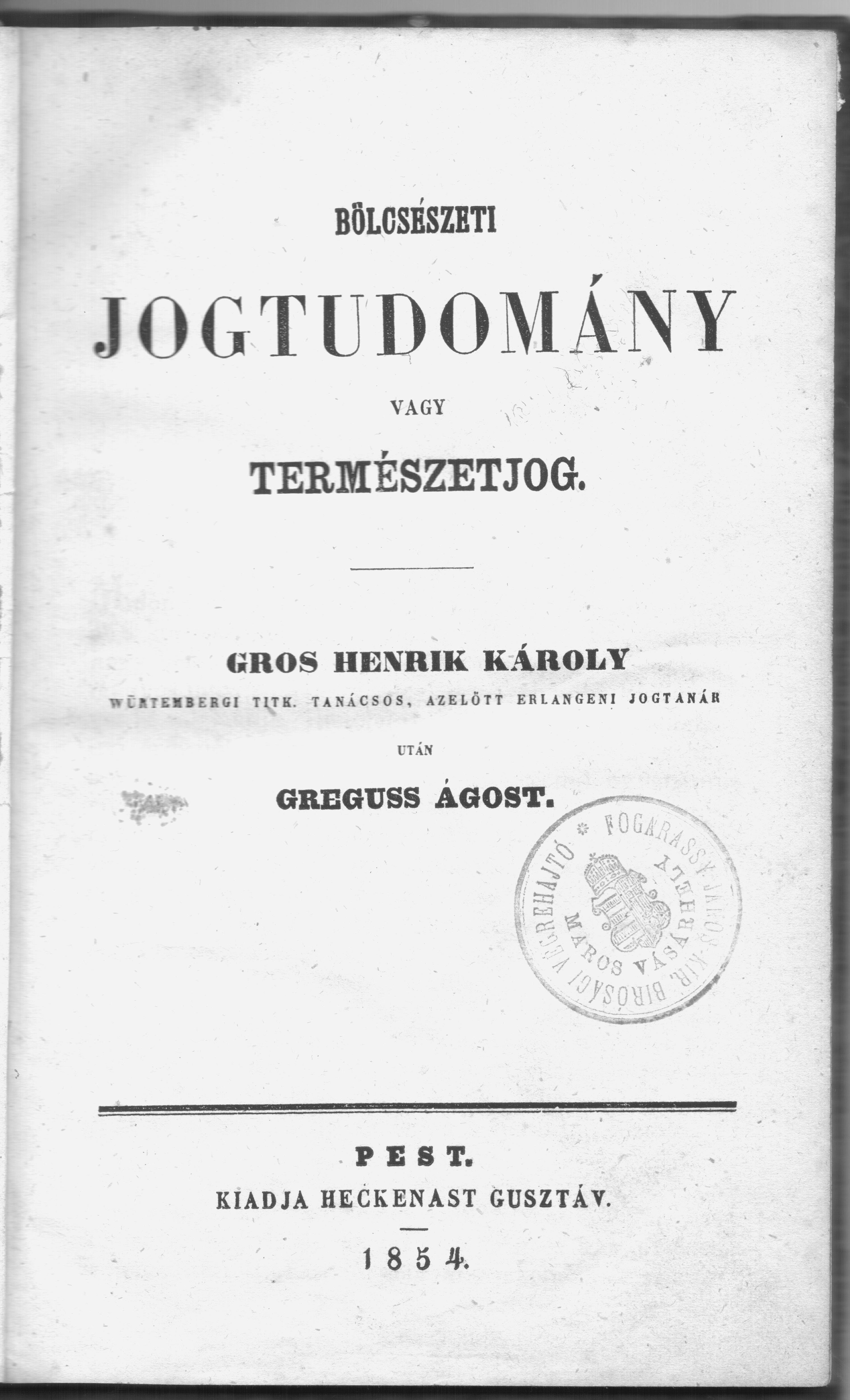 A felvétel 2014. február 22 -én készült Greguss Ágost Természetjog című könyve (Gros Henrik Károly után) címlapja.